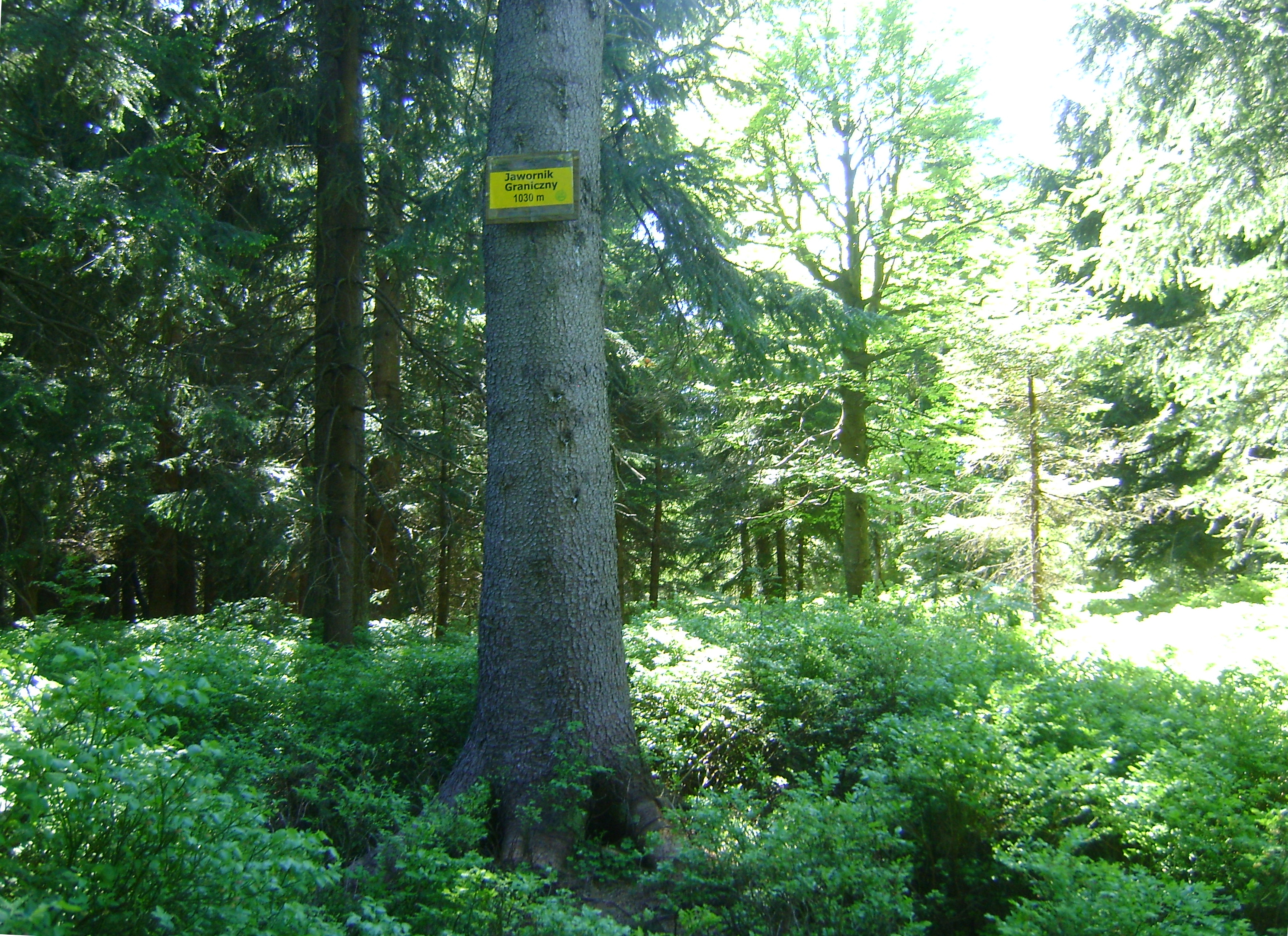 Jawornik Graniczny – wzniesienie w południowo-zachodniej Polsce, w Górach Bialskich, w Sudetach Wschodnich. Tabliczka na drzewie z nazwą szczytu wzniesienia